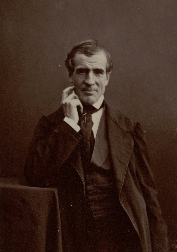 Michel Delaporte, photographie de Nadar